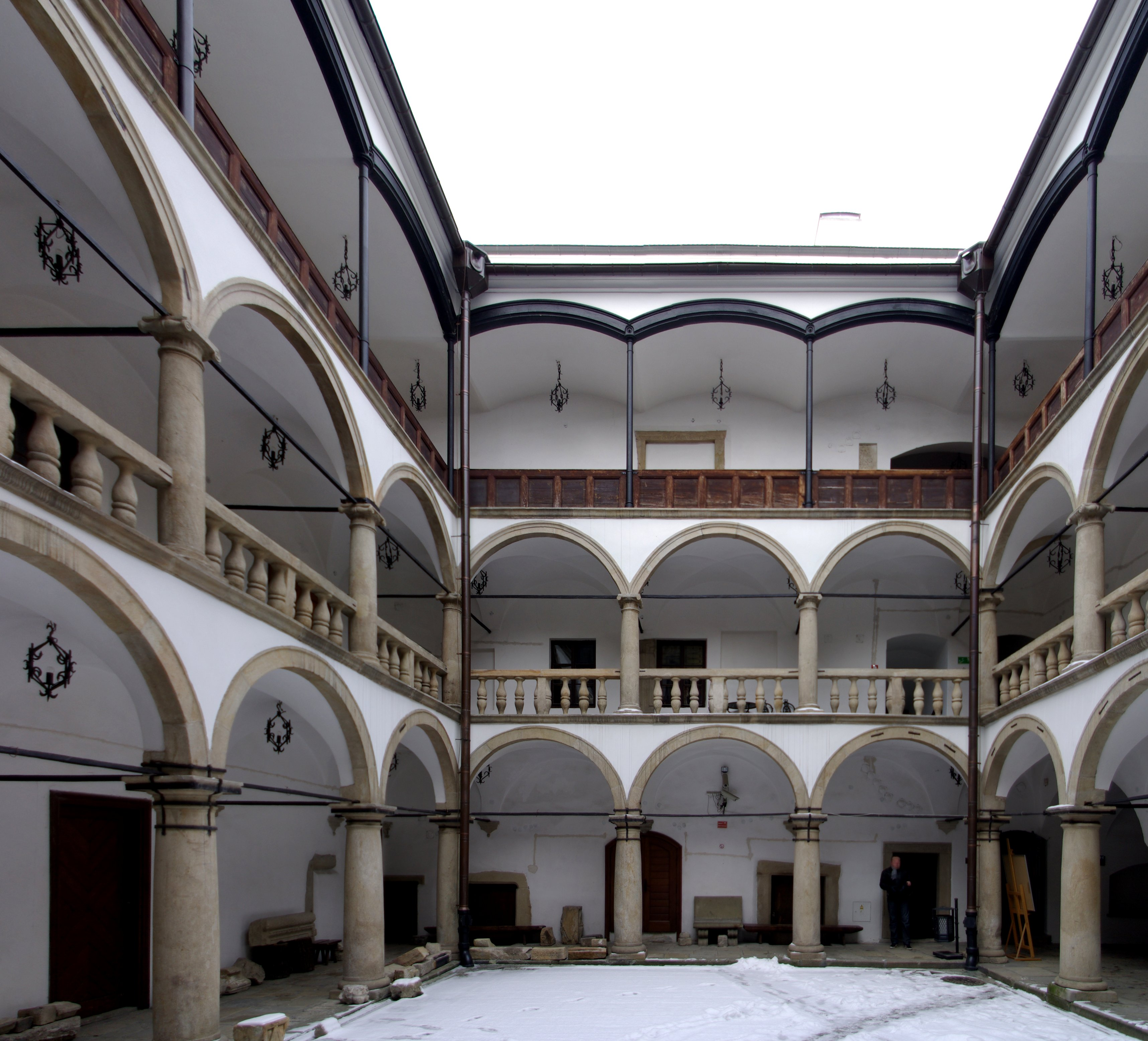 Stary Zamek w Żywcu